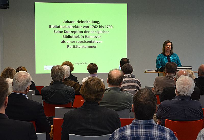 Dr. Regina Stuber vor Gästen während ihres Vortrages „Johann Heinrich Jung, Bibliotheksdirektor von 1762 bis 1799. Seine Konzeption der königlichen Bibliothek in Hannover als einer repräsentativen Raritätenkammer“ am 12. April 2016 in der für den Publikumsverkehr wieder geöffneten Gottfried Wilhelm Leibniz Bibliothek – Niedersächsische Landesbibliothek ...